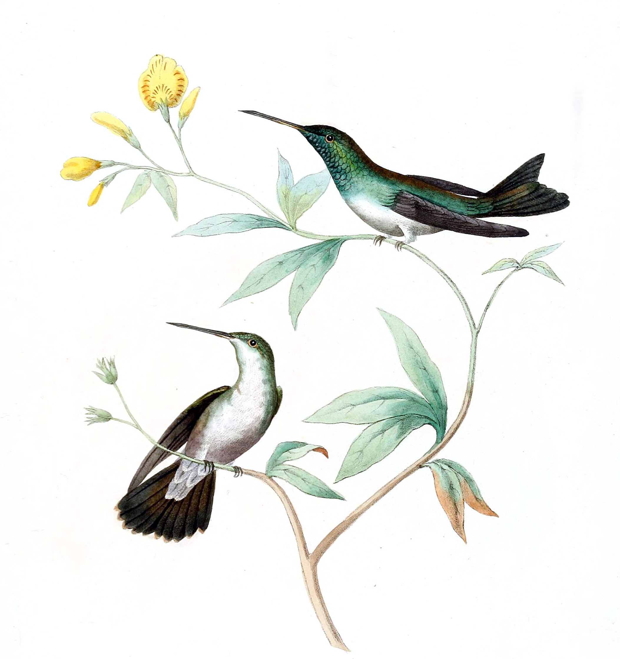 Arinia Boucardi = Amazilia boucardi F. M. Fugère del Imp. Fugère, Lyon